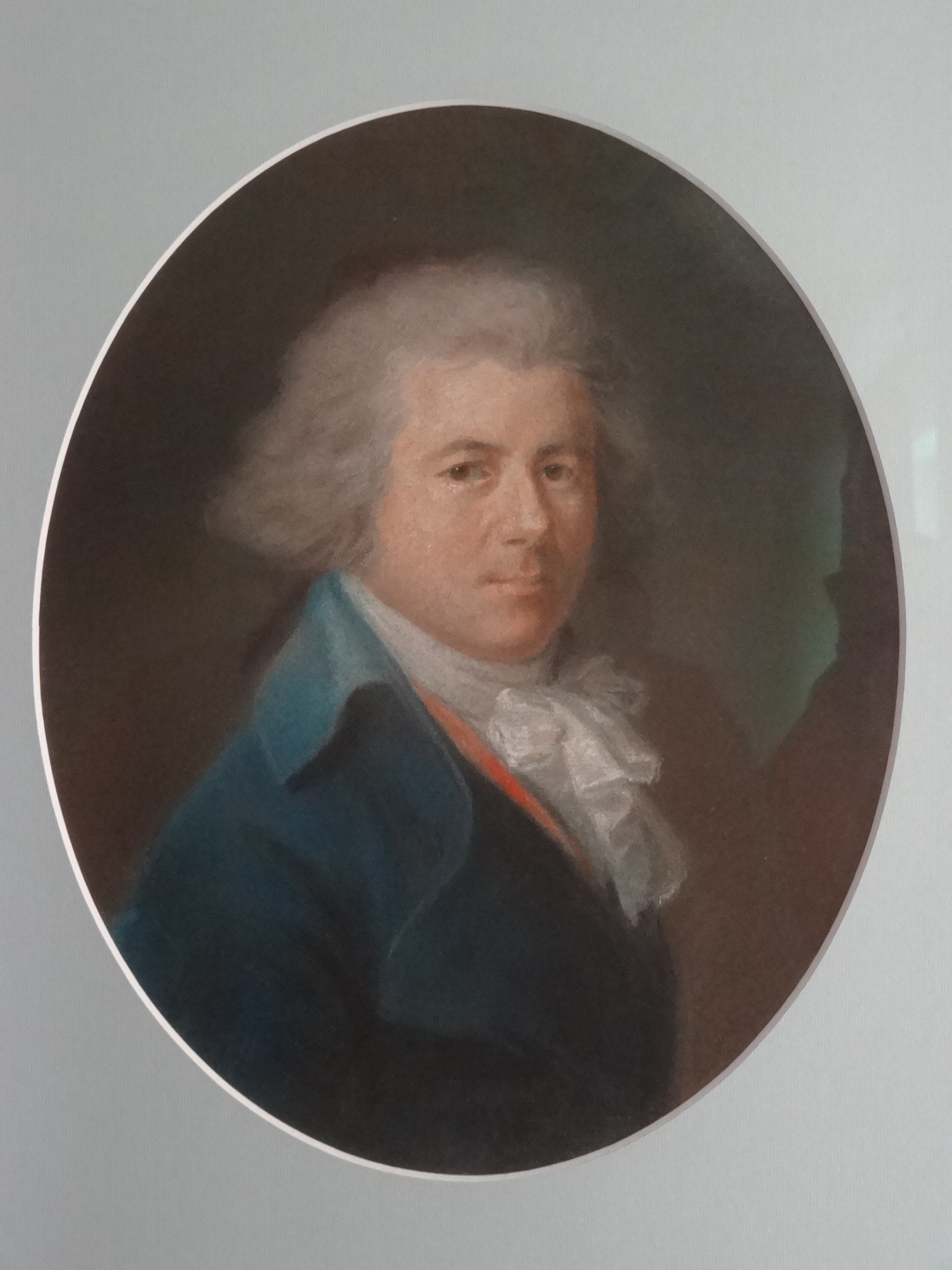 Karl Wilhelm Jerusalem, Pastell, Kopie nach einem Porträt. Die gepuderten Haare lassen ihn älter erscheinen